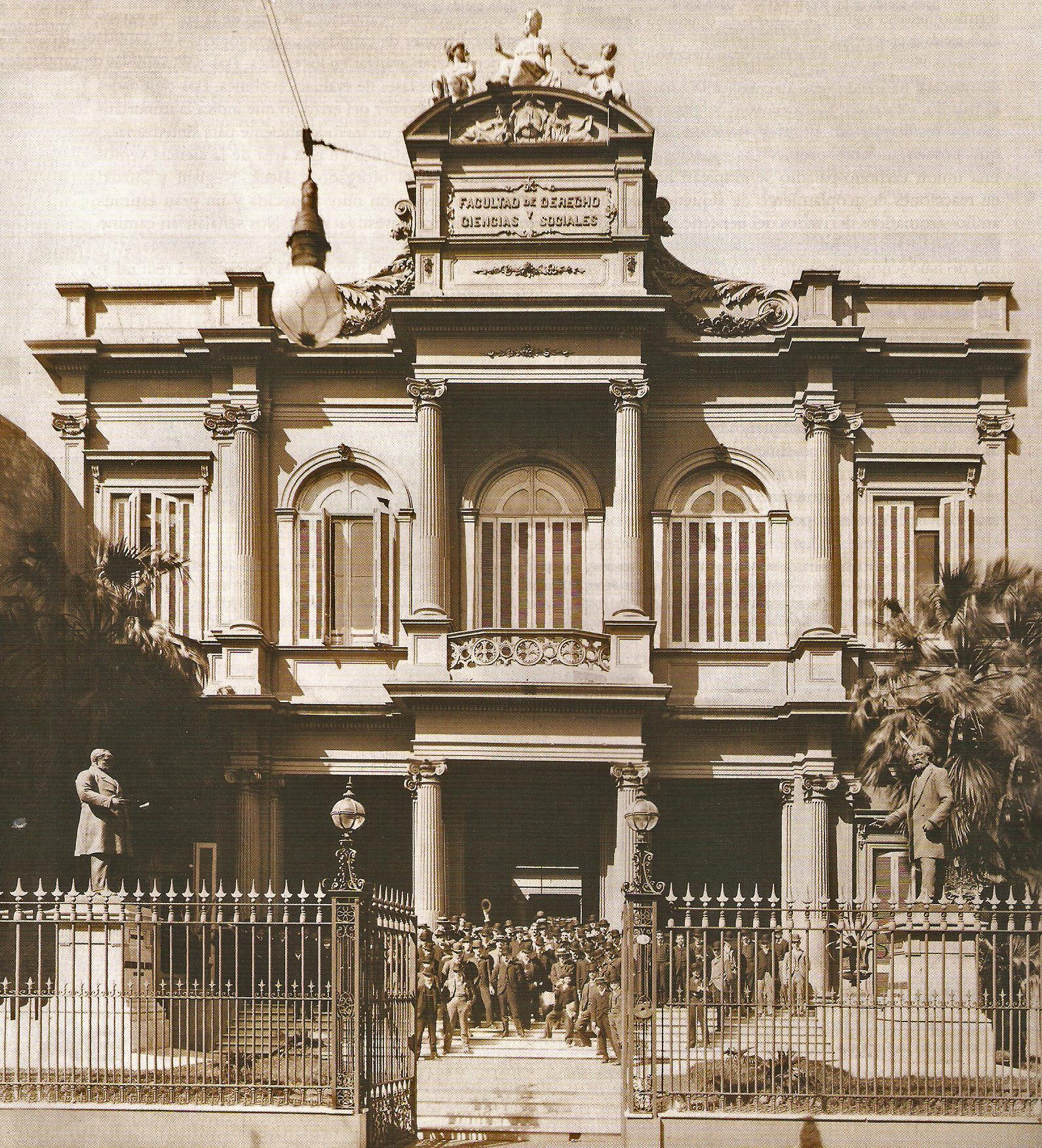 Edificio que ocupó la Facultad de Derecho de la Universidad de Buenos Aires, en Moreno 350 (hoy Museo Etnográfico), construido por Pedro Benoit. En 1925 la facultad se trasladó a Las Heras 2214.